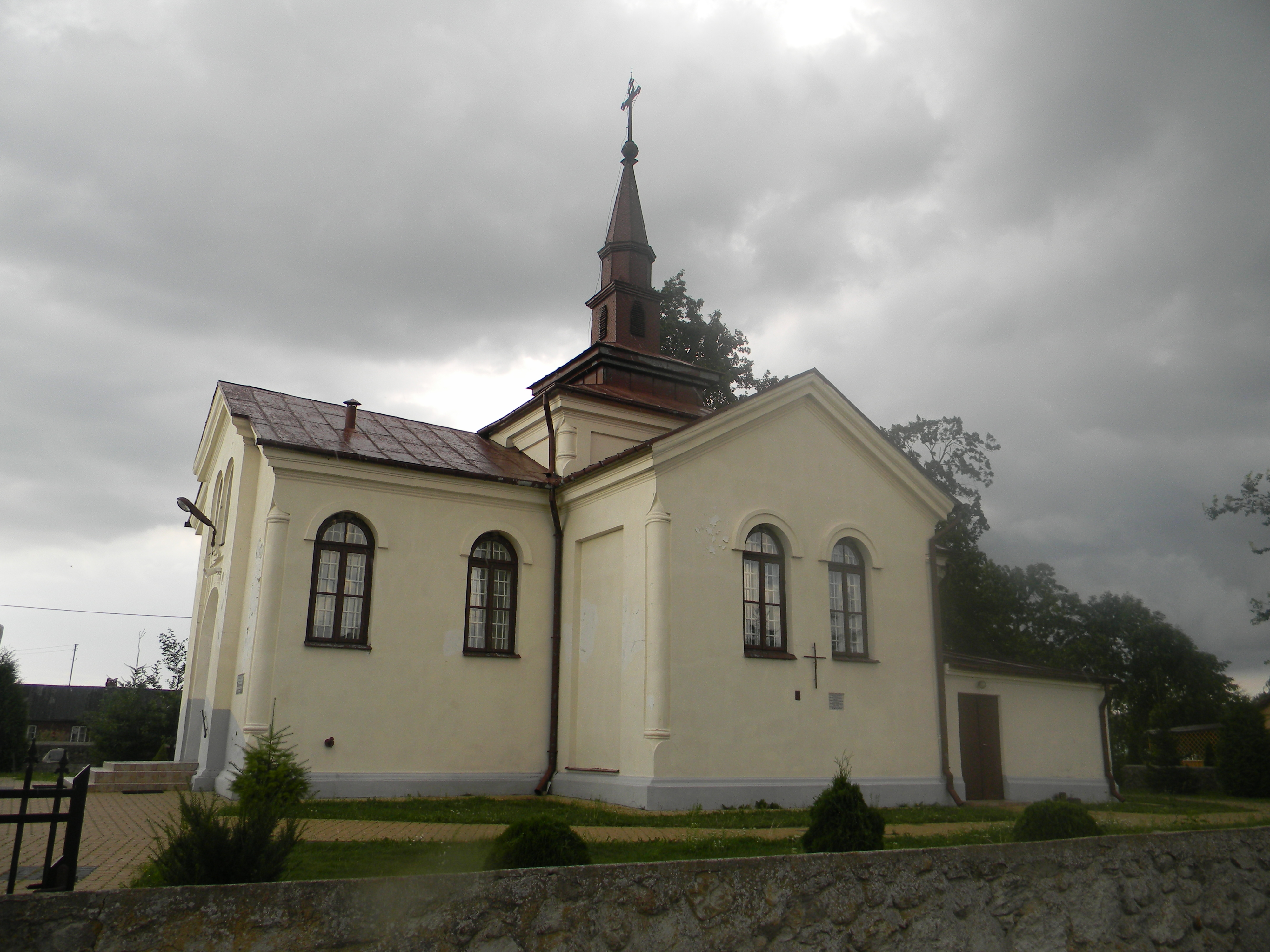 Łysów - pierwotnie cerkiew unicka i prawosławna, obecnie rzymskokatolicki kościół parafialny pw. Matki Boskiej Różańcowej, 1775, 1880.